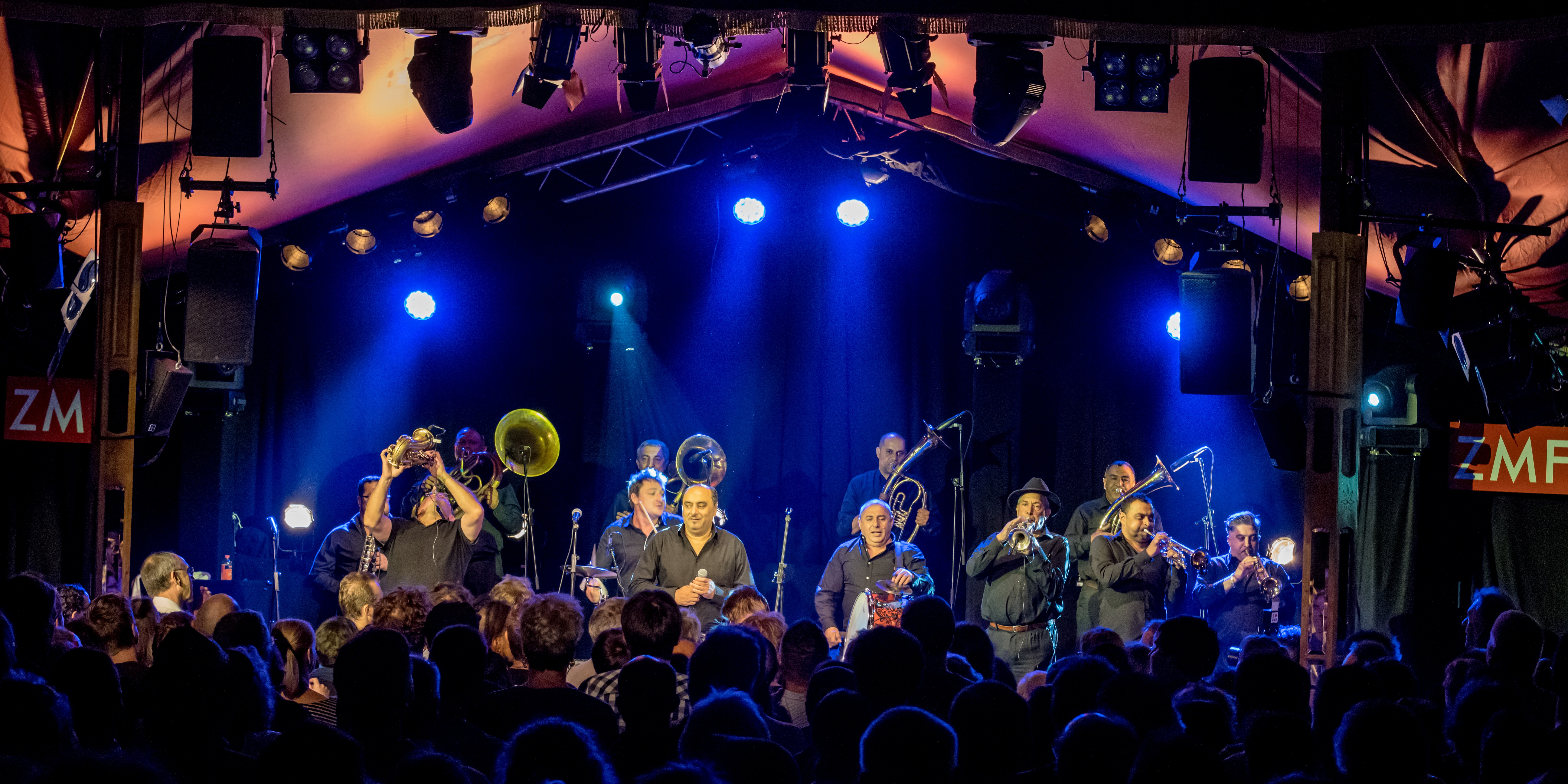 Bilder vom Zelt Musik Festival 2017 in Freiburg im Breisgau Fanfare Ciocarlia am 10.07.2017